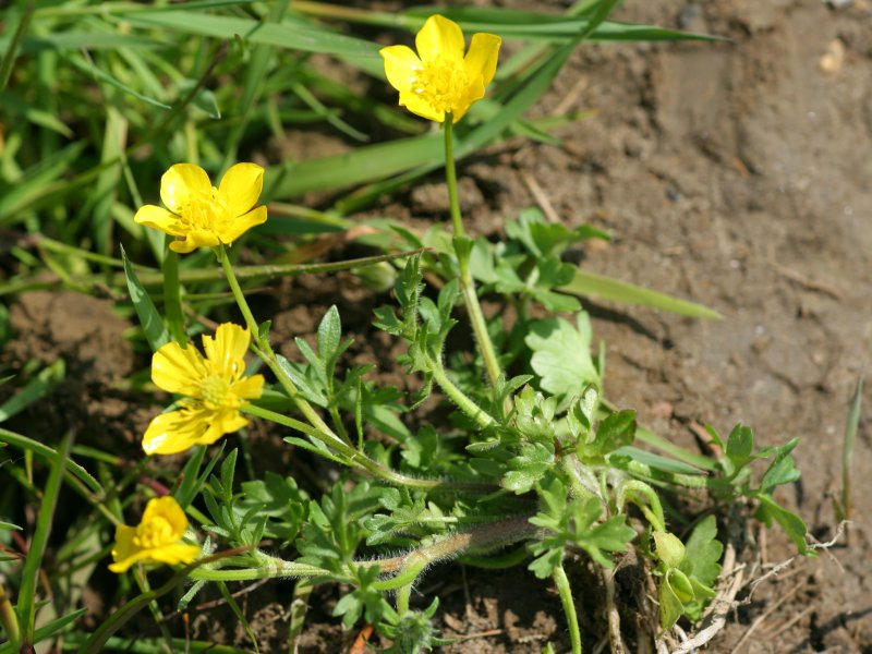 Rauher Hehnenfuß (Ranunculus sardous)